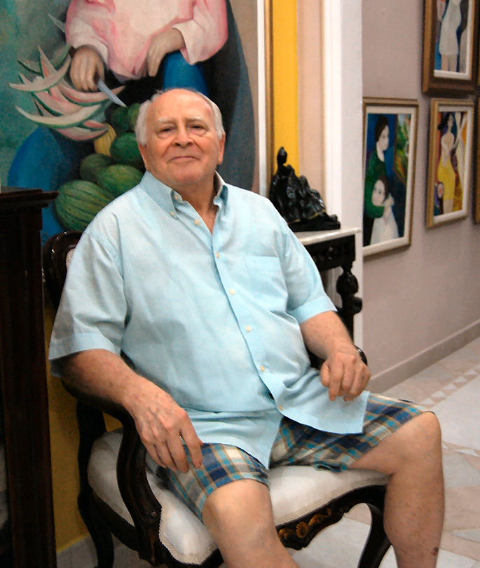 Escultor Eladio Gil Zambrana autor de la estatua de La India Catalina, en su casa de Cartagena de Indias, Colombia.